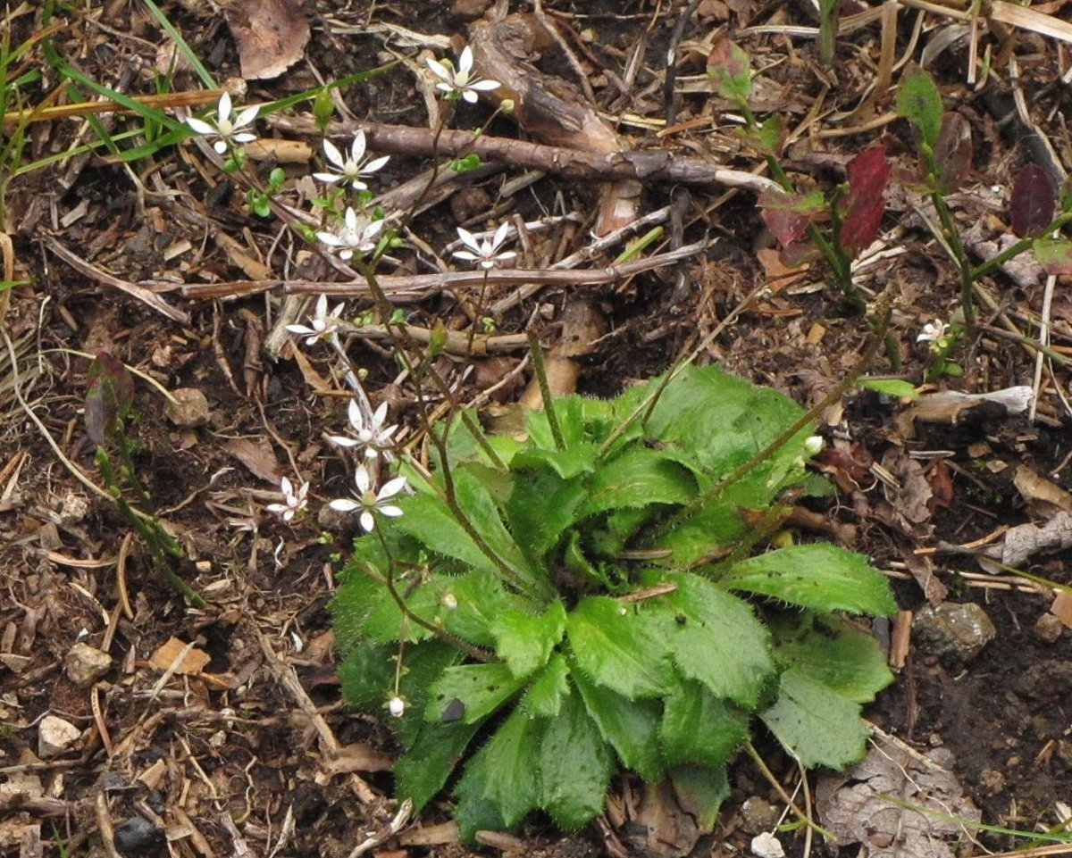 Zvezdasti kamnokreč na Krnesu.